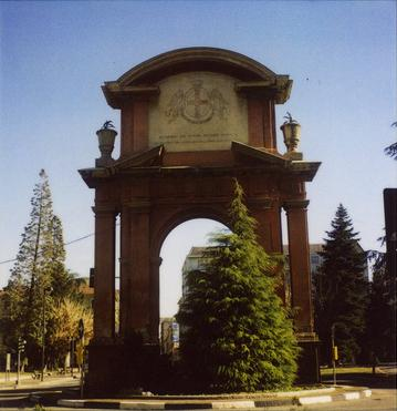 Alessandria, Arco di Trionfo di Piazza Matteotti.